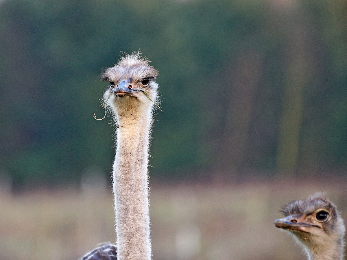 Strauße in Mecklenburg